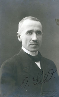 Olaf Sild